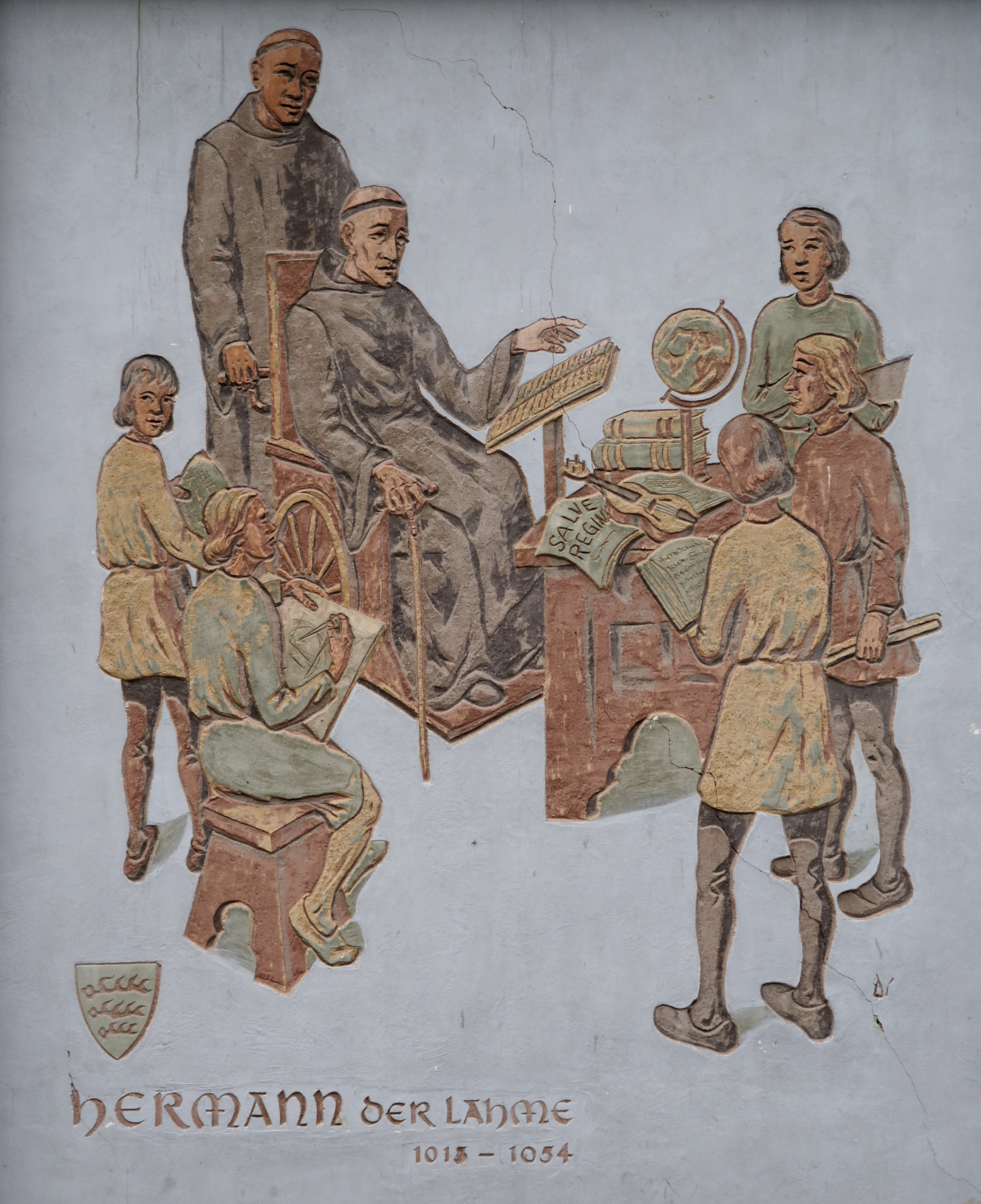 Veringenstadt: Sgrafitto Hermann der Lahme - Hermanus Contractus *18.Juli 1013 - † 24. September 1054. Aus dem Geschlecht der Grafen Altshausen-Veringen